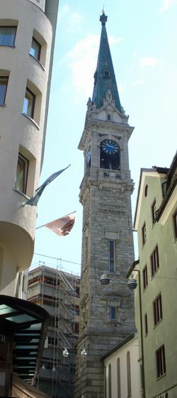 Turm der evangelischen Dorfkirche / St. Moritz /CH